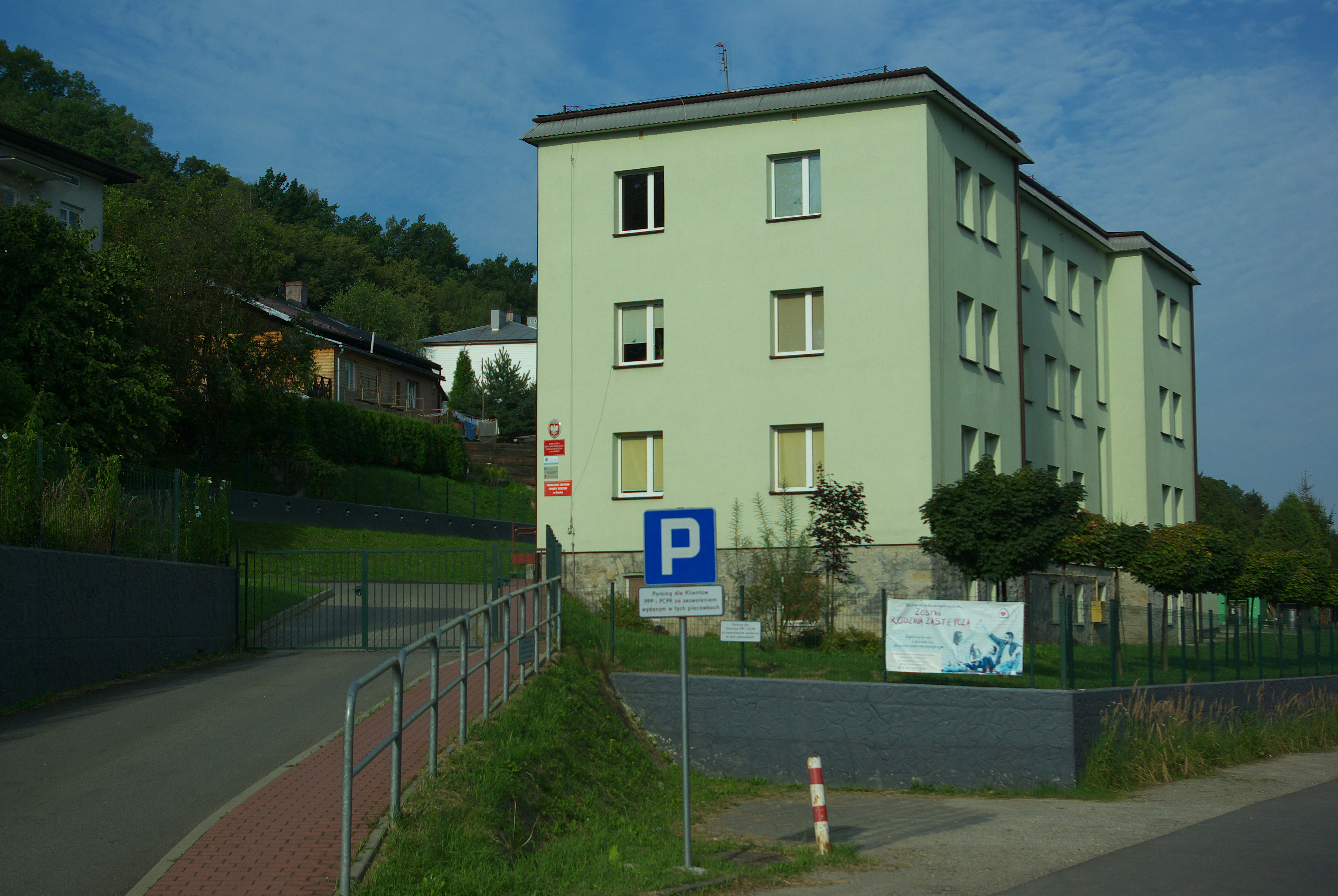 Budynek przy ul. Szopena 5 w Sanoku.